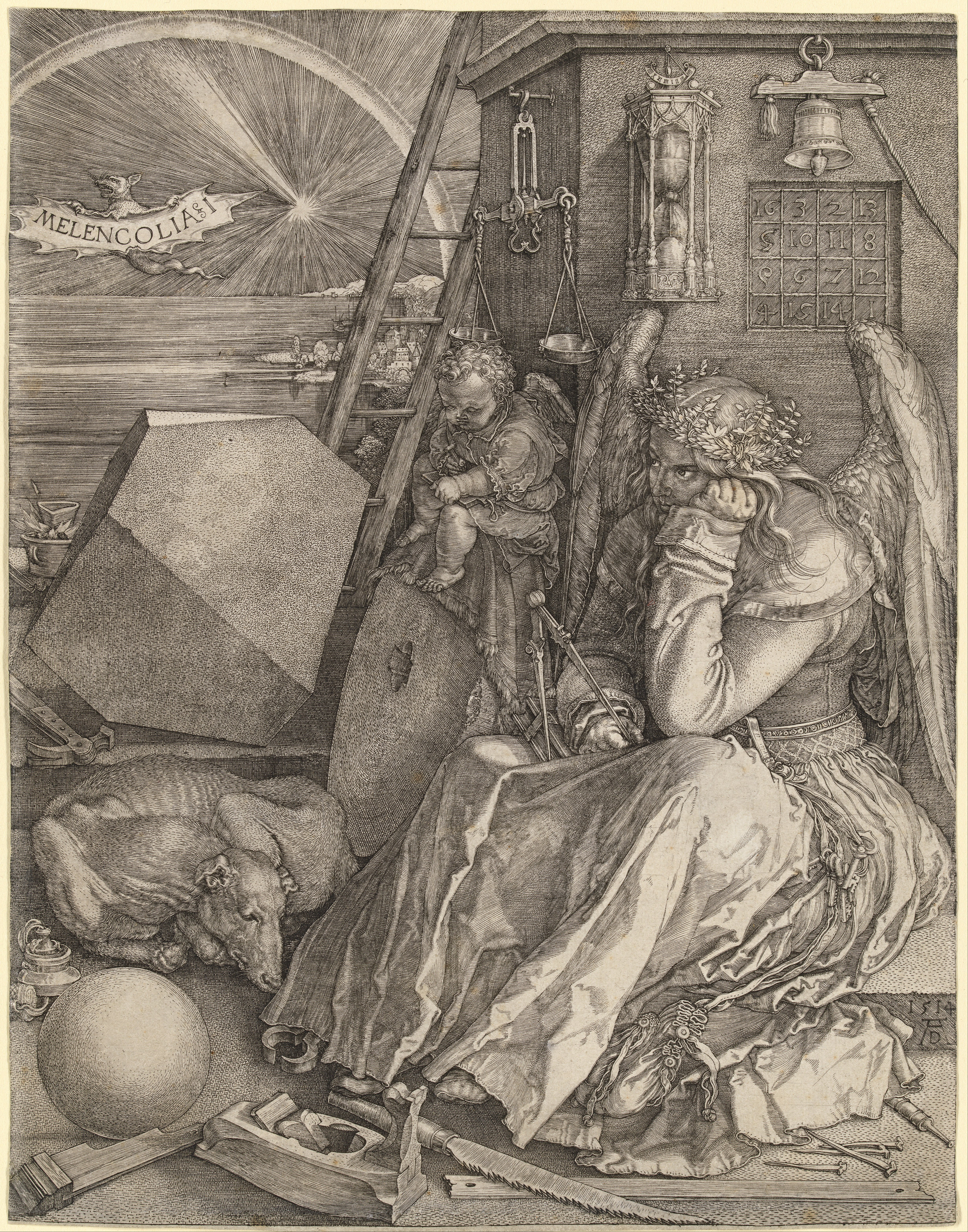 1st-state